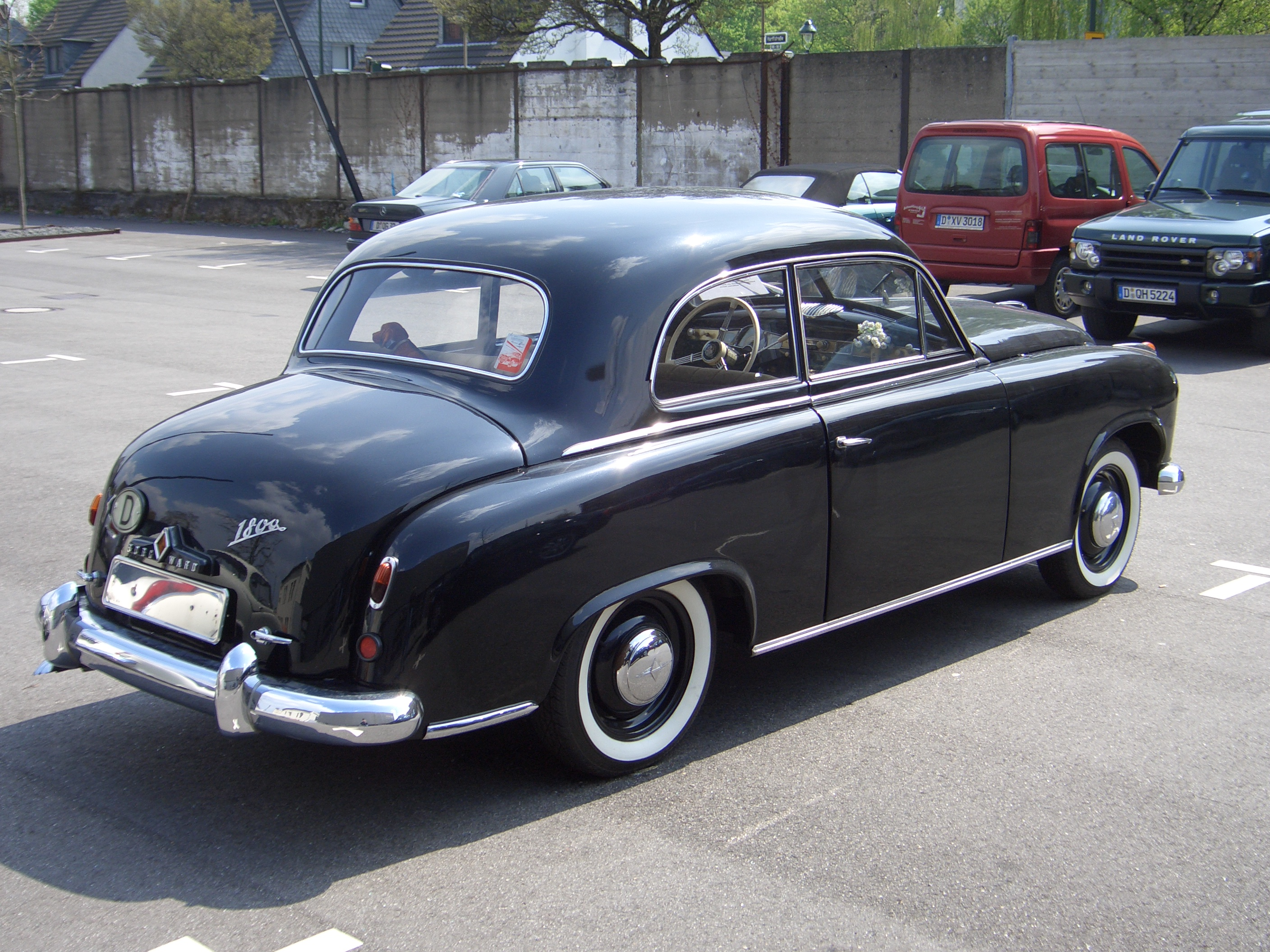 Borgward Hansa 1800 (2-door), 1952-1954, seen at MEILENWERK in Duesseldorf, Germany